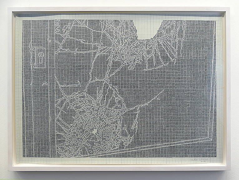 Saskia Schüler, "Einbruch", 2016, Tusche auf Millimeterpapier, 54 x 73 cm